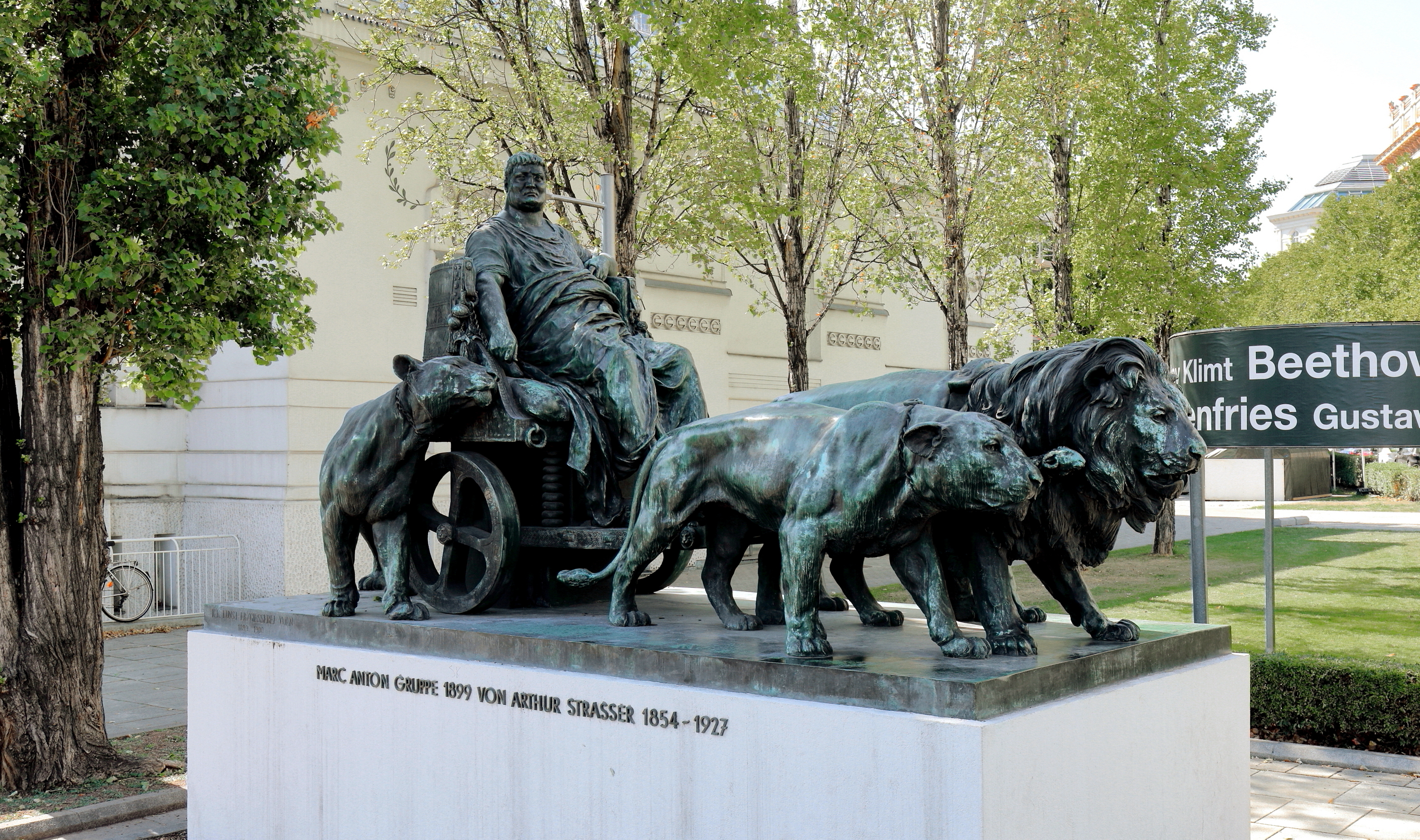 Das Marc-Anton-Monument, auch als Marc-Anton-Gruppe bezeichnet, an der Friedrichstraße und neben dem Secession-Gebäude im 1. Wiener Gemeindebezirk Innere Stadt.Die Bronze-Großplastik wurde von 1899 bis 1900 von dem Secessions-Künstler Arthur Strasser für die Weltausstellung 1900 geschaffen und Ende 1900 oder 1901 neben dem Secessiongebäude aufgestellt. Es zeigt den römischen Feldherrn und Politiker Marcus Antonius im Triumphwagen, der von Löwen gezogen wird.